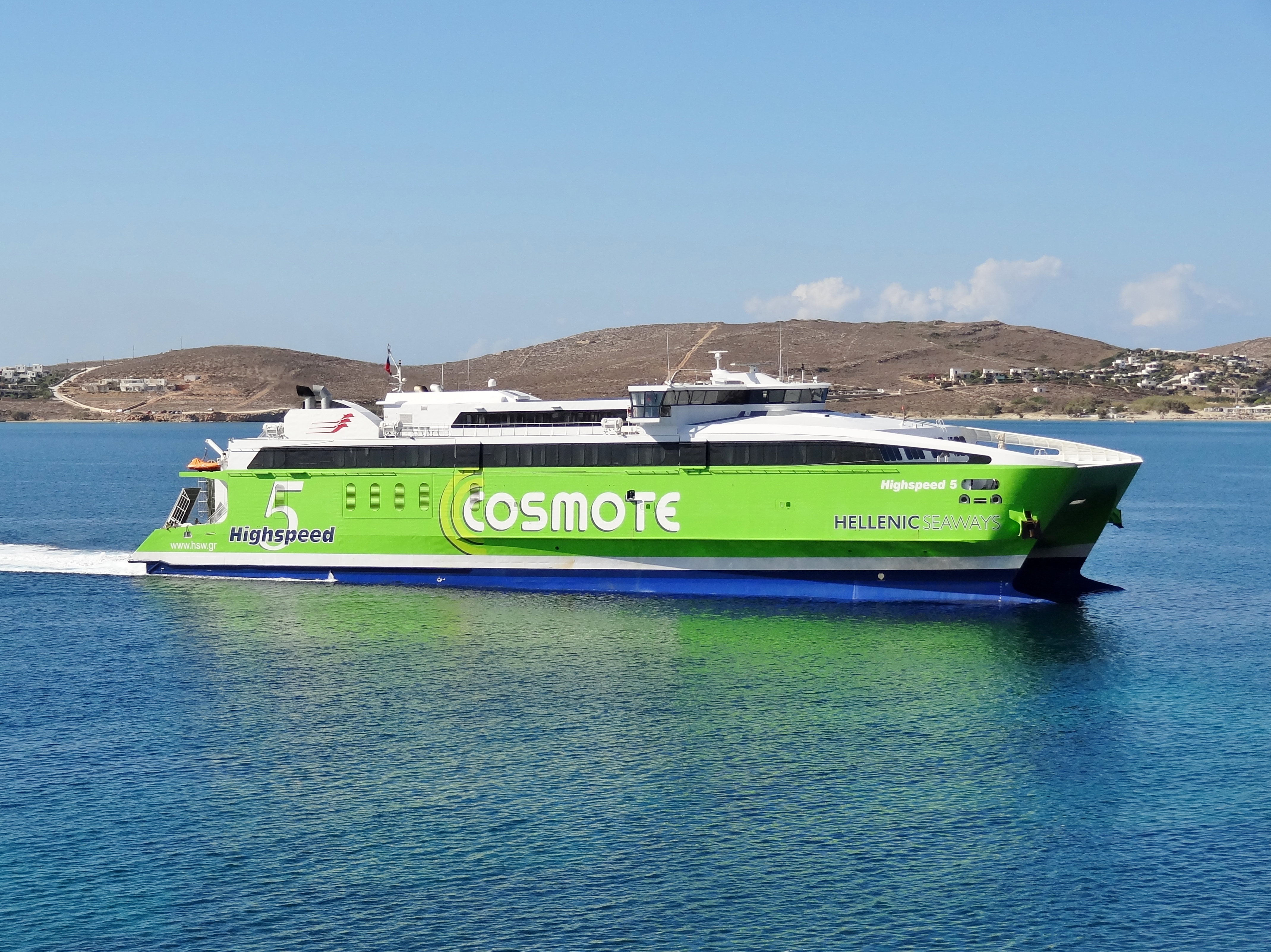 Fähre Highspeed 5 der Gesellschaft Hellenic Seaways in der Parikia-Bucht an der Westküste von Paros, Kykladen, Griechenland